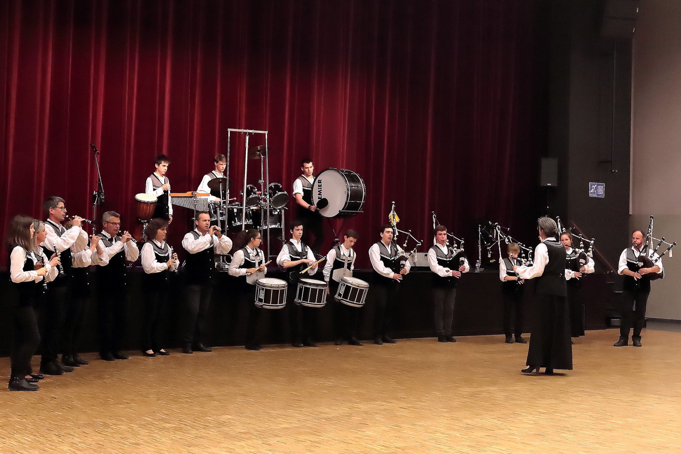 Le Bagad Dor Vras lors de la Fête de la Bretagne (Gouel Breizh) à Argentré-du-Plessis (35) le 22 mai 2016.